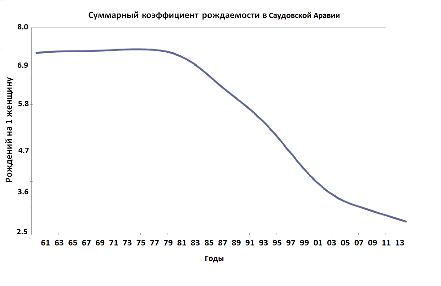 Суммарный коэффициент рождаемости в Саудовской Аравии 1961-2013 гг. по данным Департамент по экономическим и социальным вопросам ООН (Отдел народонаселения).